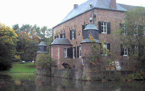 De afbeelding is een door mij gemaakte foto van Kasteel Erenstein.